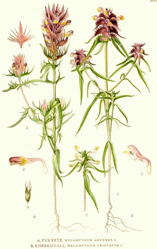 Melampyrum arvense L., Melampyrum cristatum L. Original Description A. Pukvete, Melampyrum arvense L. B. Korskovall, Melampyrum cristatum L.